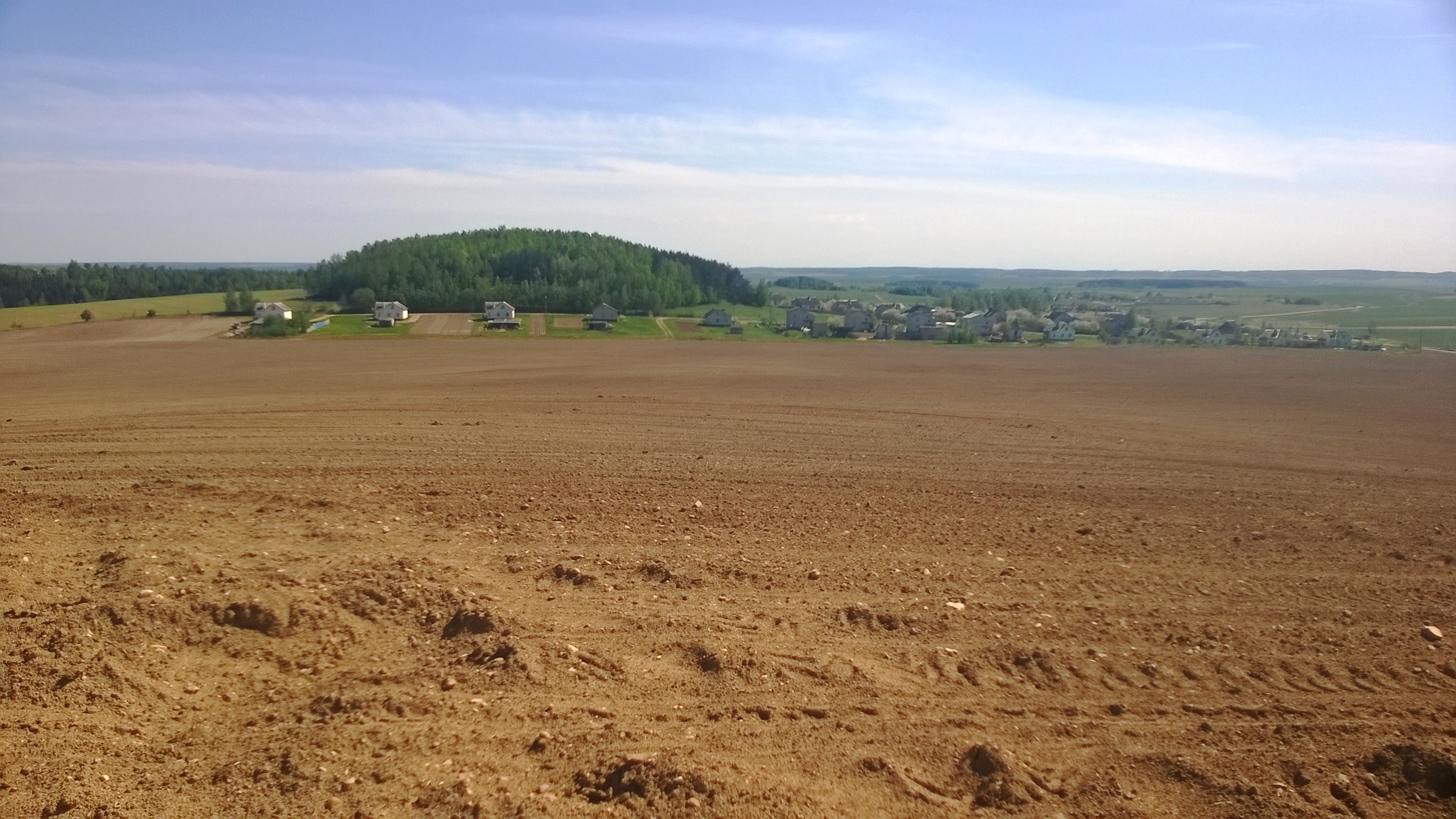 Беларуская (тарашкевіца): Ашмянскае ўзвышша каля вёскі Пекары